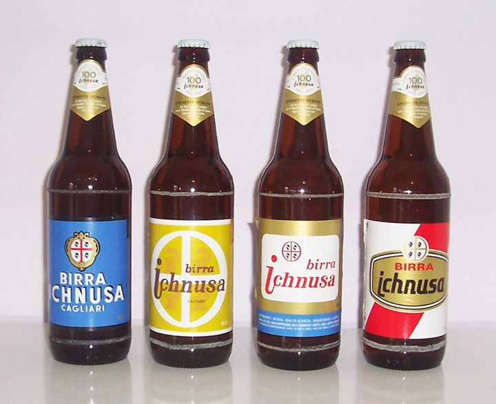 Etichette Storiche Centenario